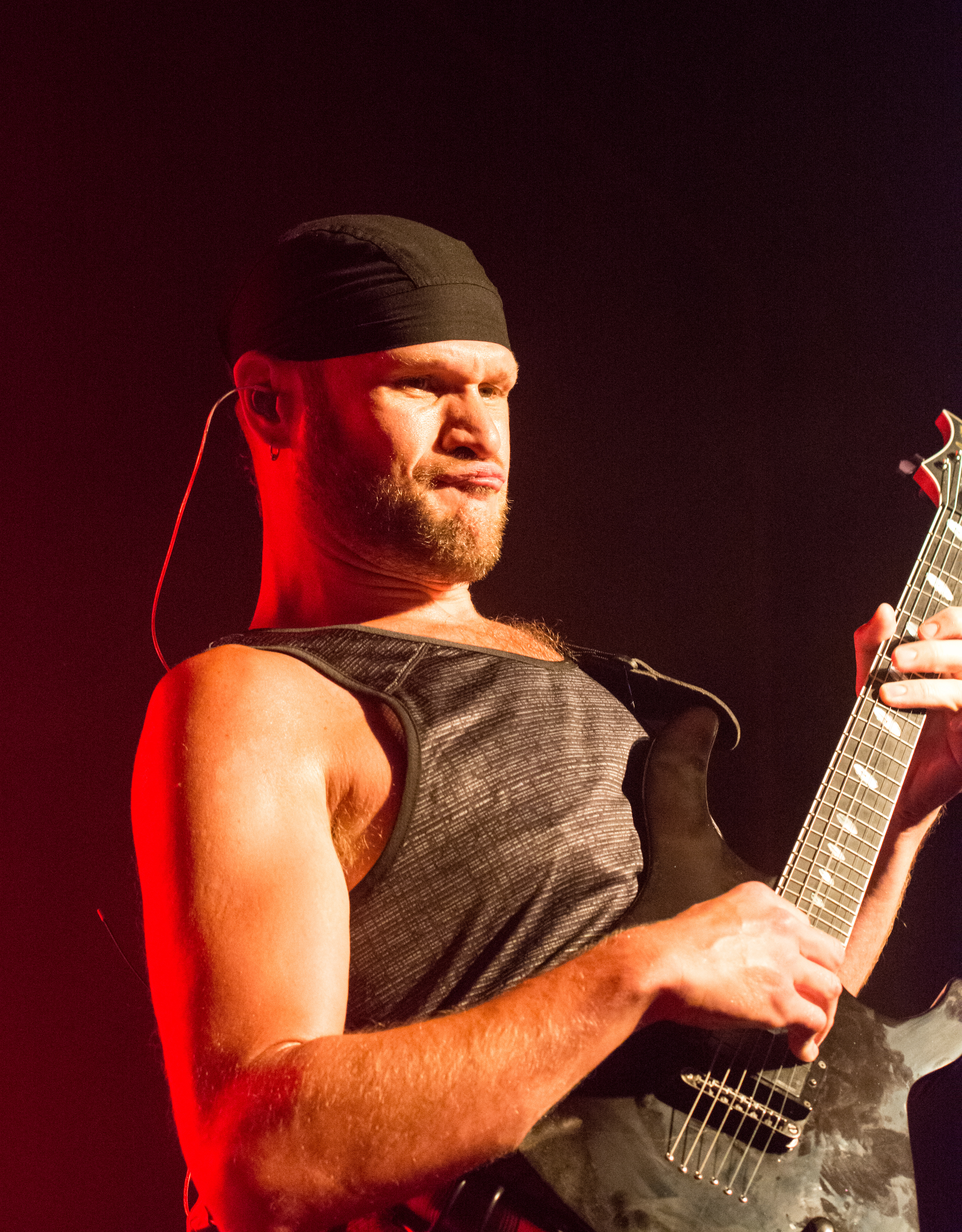 Killswitch Engage beim Rawk Attack 2016